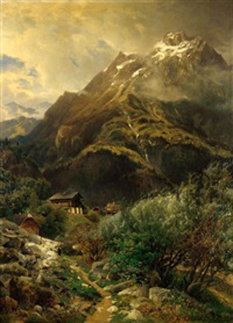 Hochgebirgslandschaft, Eduard Schoenfeld (* 24. Mai 1839 in Düsseldorf; † 27. November 1885 ebenda) war ein deutscher Maler